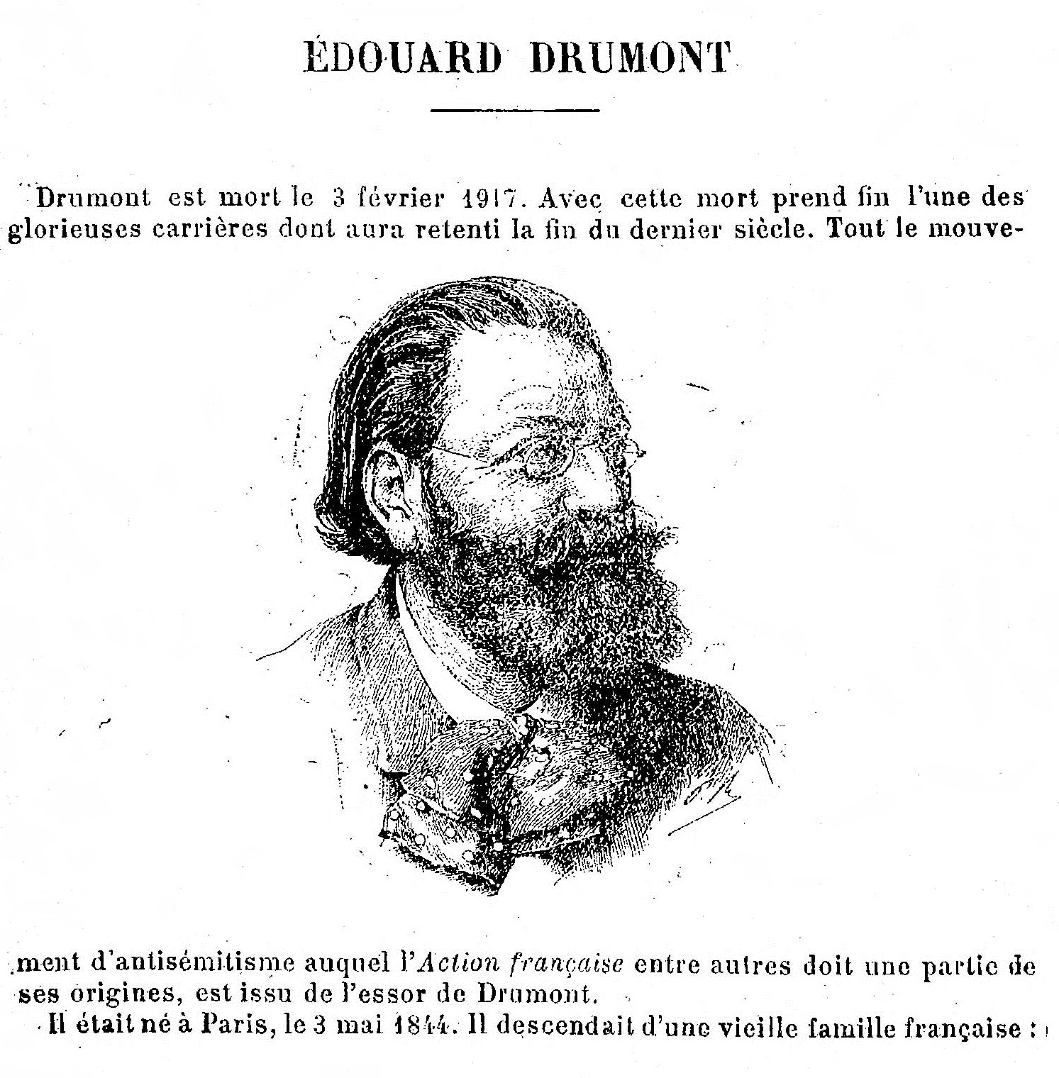 Hommage rendu à Édouard Drumont, Almanach de l'Action française, 1918.